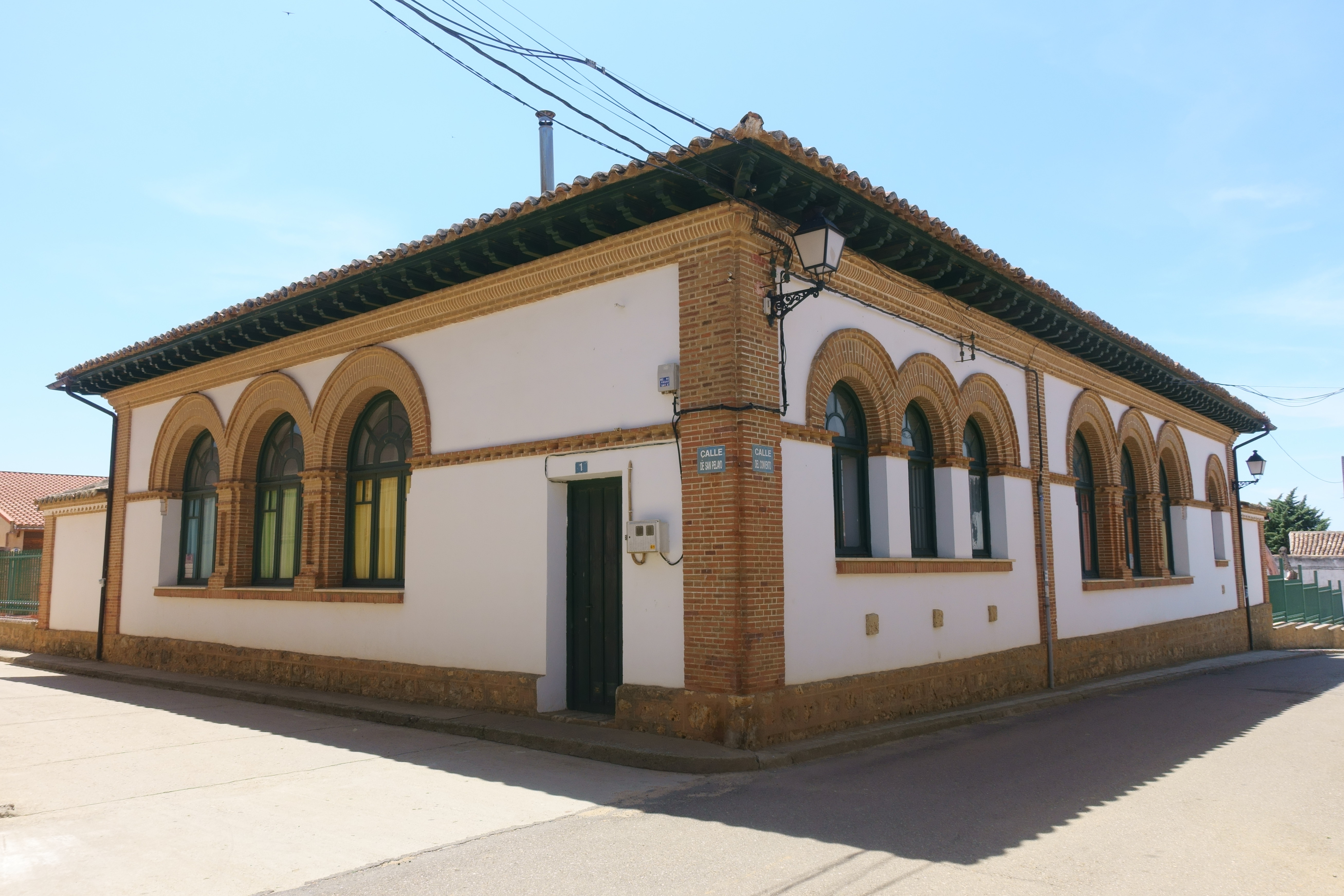 Escuelas de Villafrechós (Valladolid, España).